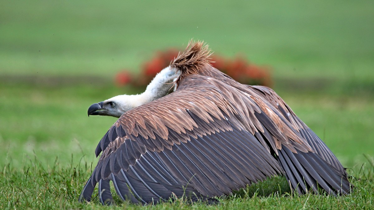 Futterneidischer Gänsegeier im Vogelpark Walsrode: Angriff auf Nachbarn, der Futter bekommen hatte.